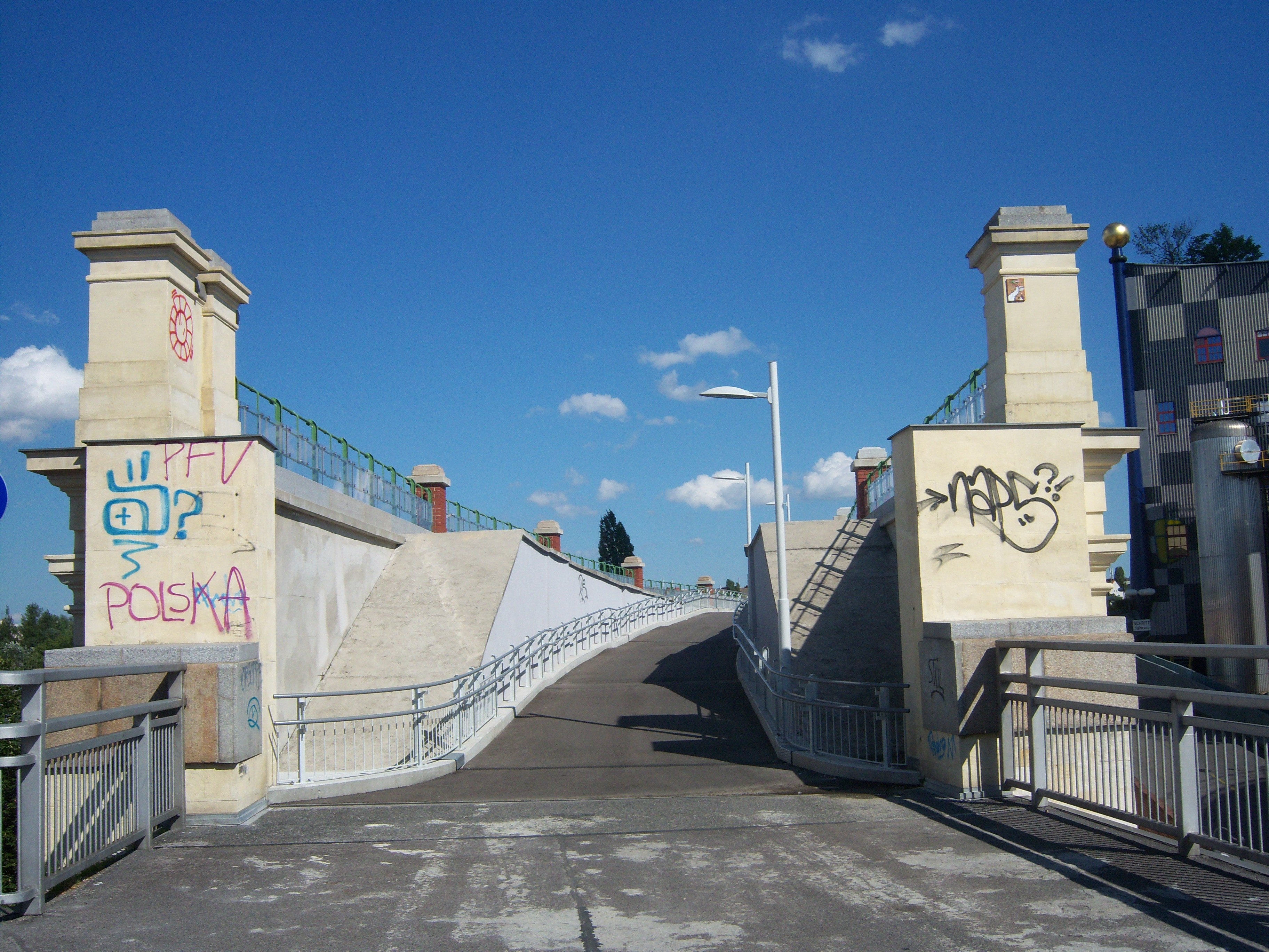 ehemaliger Stadtbahn-Verbindungsbogen ist heute ein Fuß- und Radweg